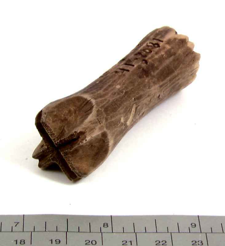 Smørrose eller smørstempel fra Surnadal i Møre og Romsdal, lengde 6 cm. Foto Anne-Lise Reinsfelt / Norsk Folkemuseum, NF.1911-1802C.